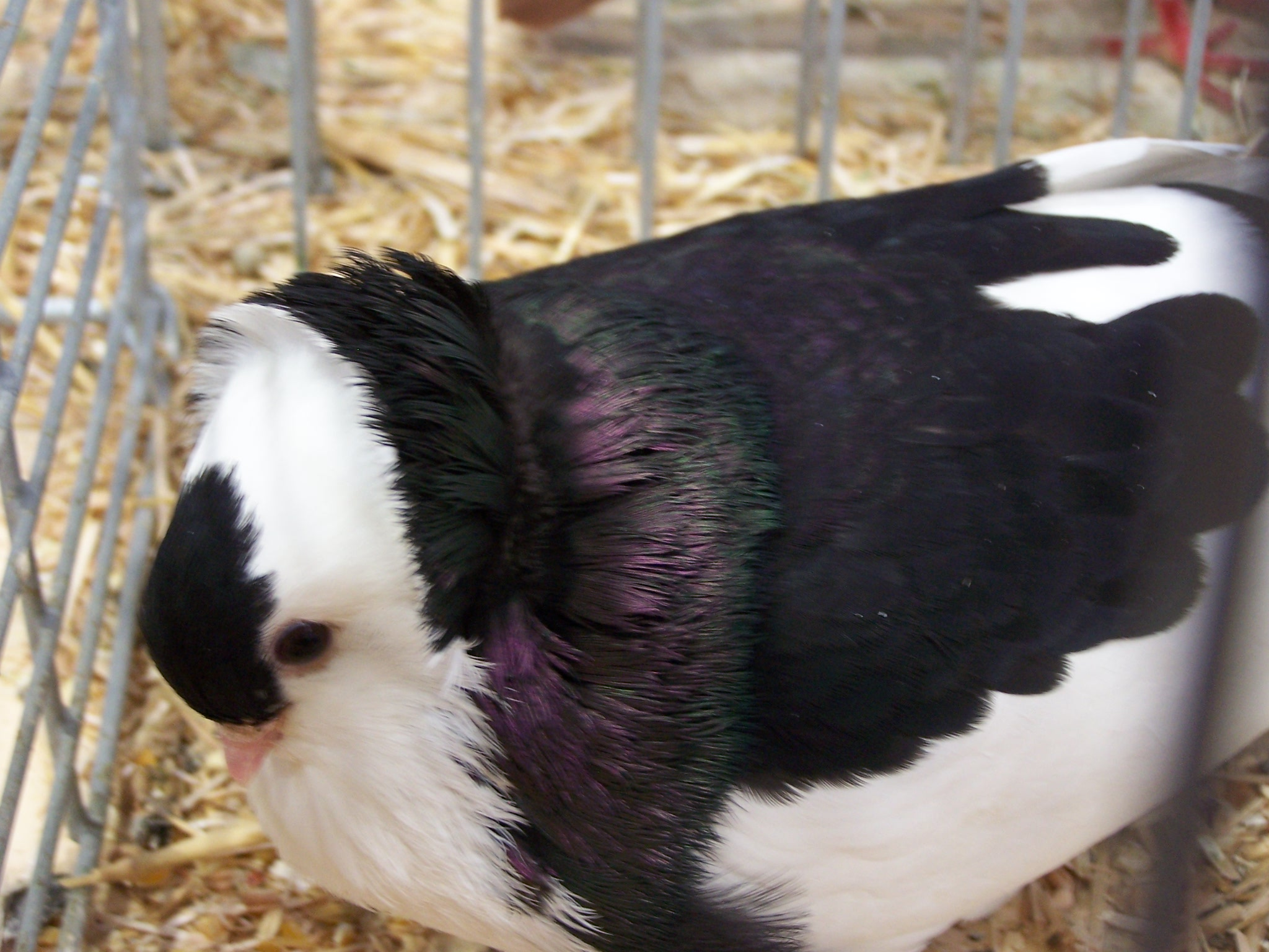 Fely zwart